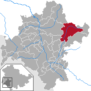 Steinbach-Hallenberg in Thuringia - District Schmalkalden-Meiningen